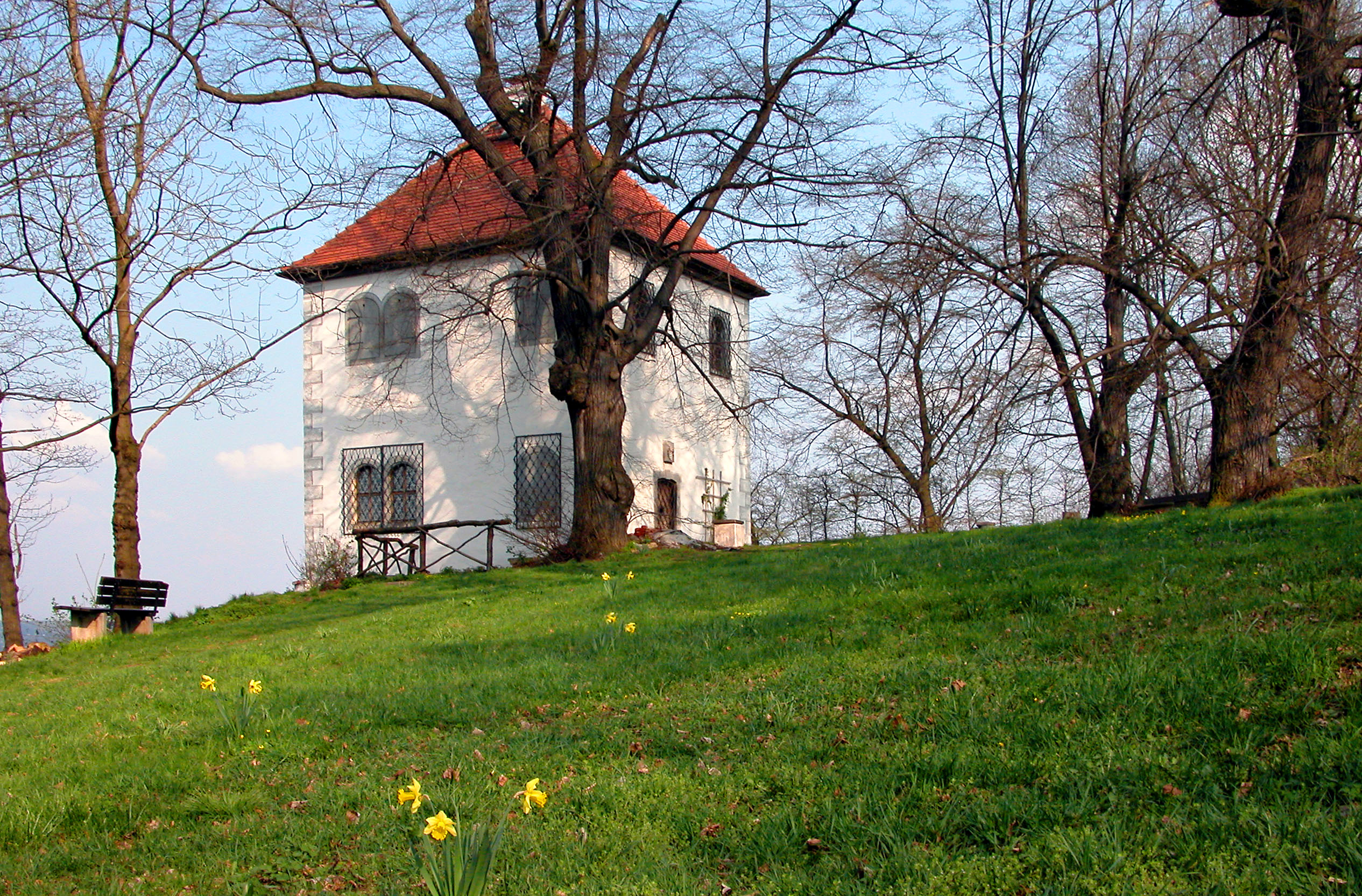 Totenhäuschen - ein Garten- und Lusthaus am Elbhang in Batzdorf